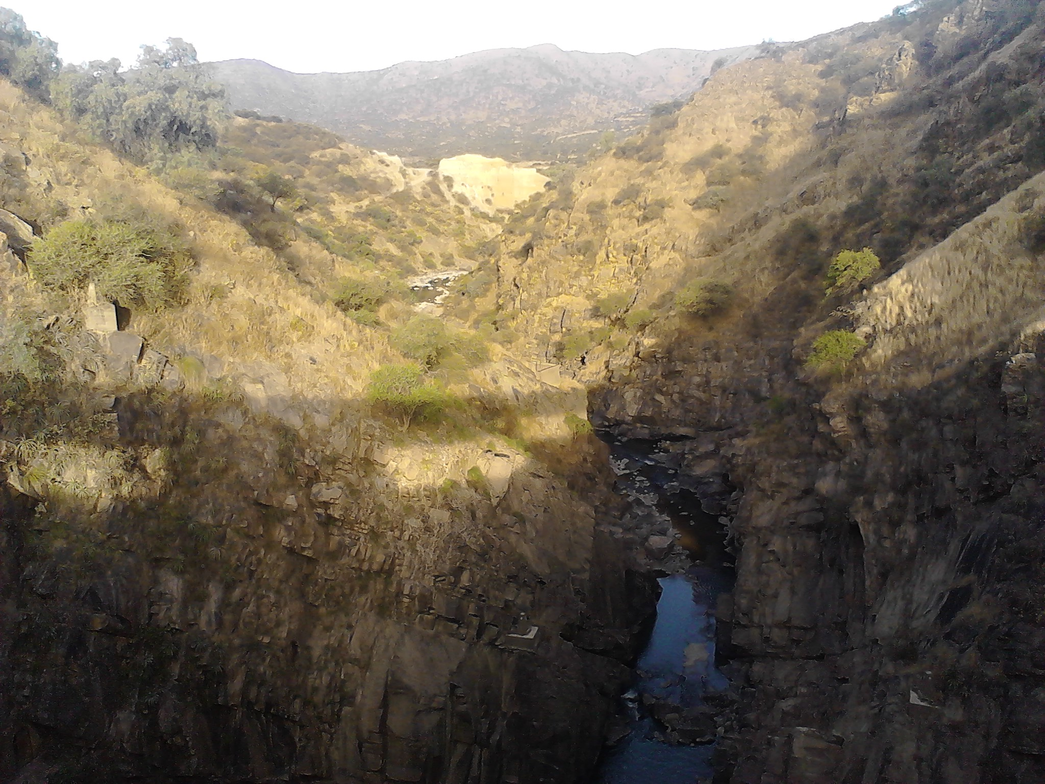 Entwässerung des Lago San Jacinto bei Tarija, Bolivien